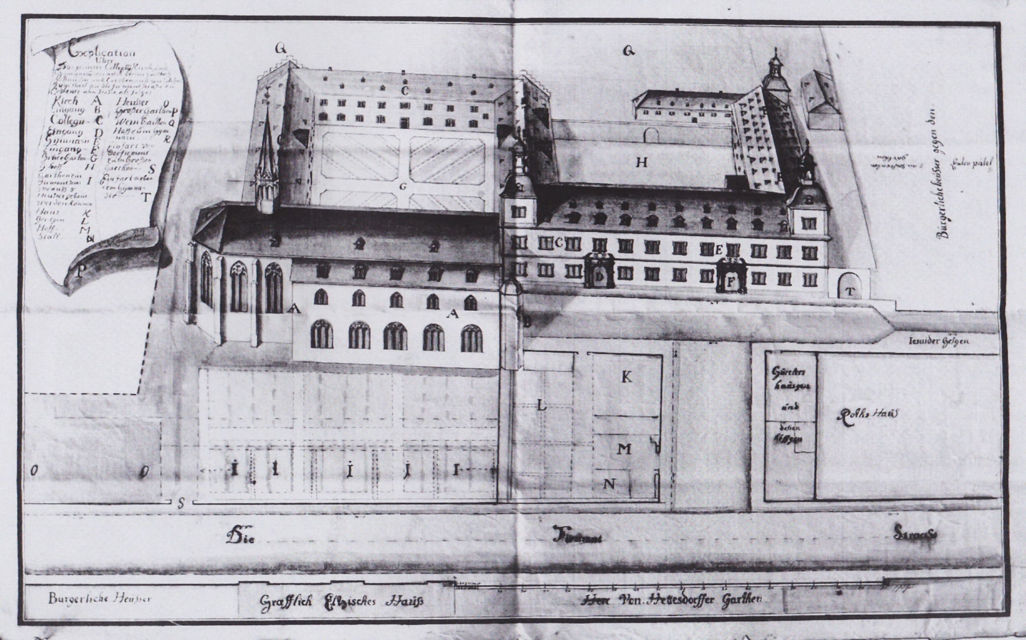 Jesuitenkolleg und -Kloster in Koblenz, Plan von Nikolaus Lauxen 1769